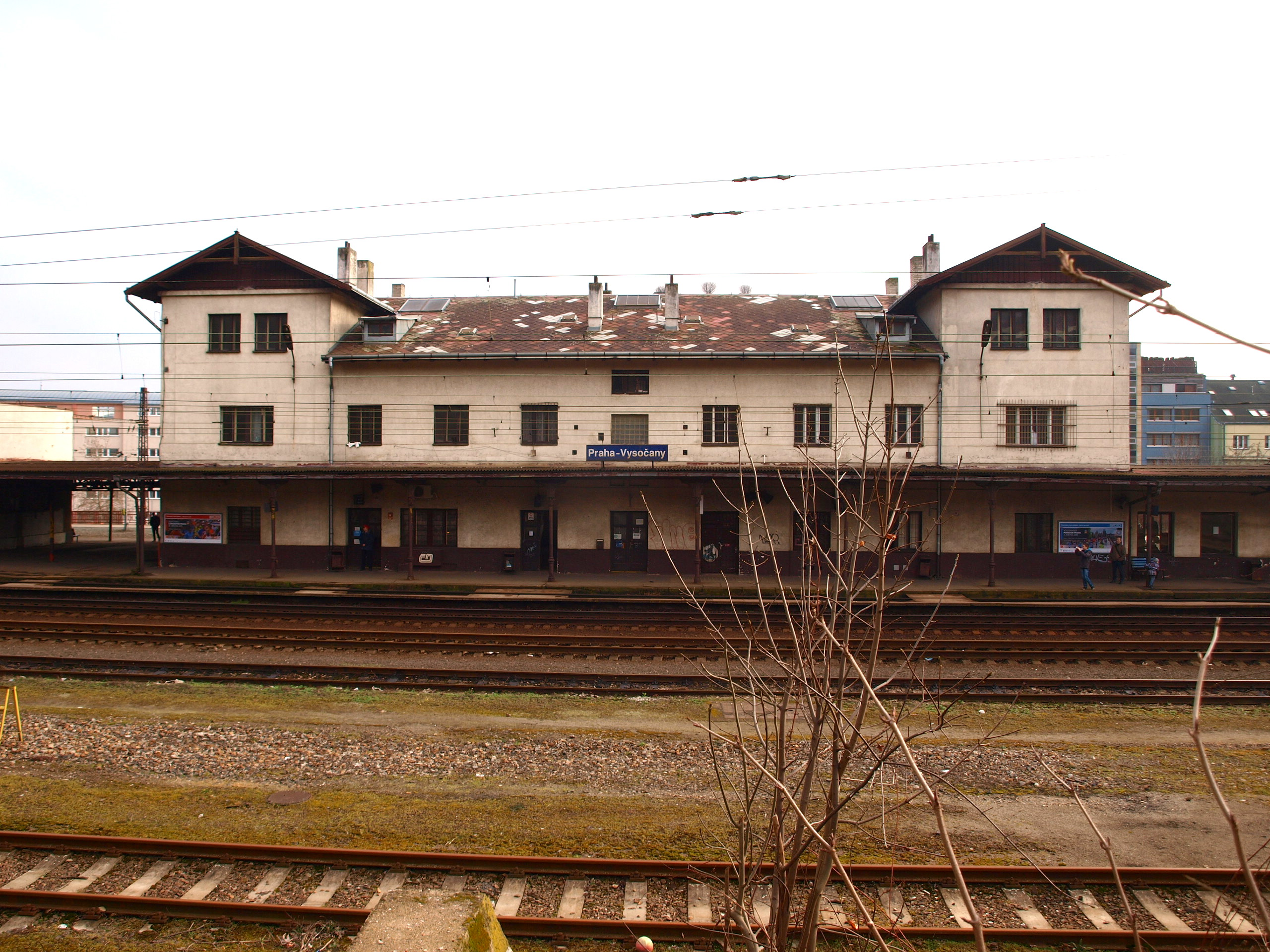 Nádraží Vysočany